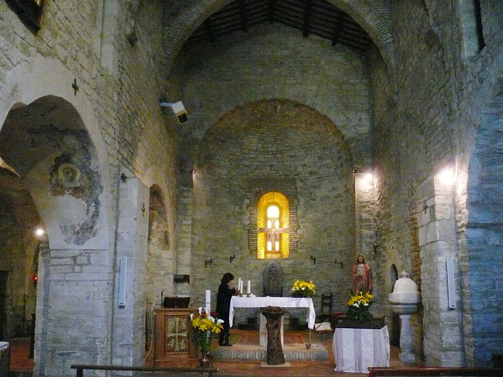 S. Michele church, interior